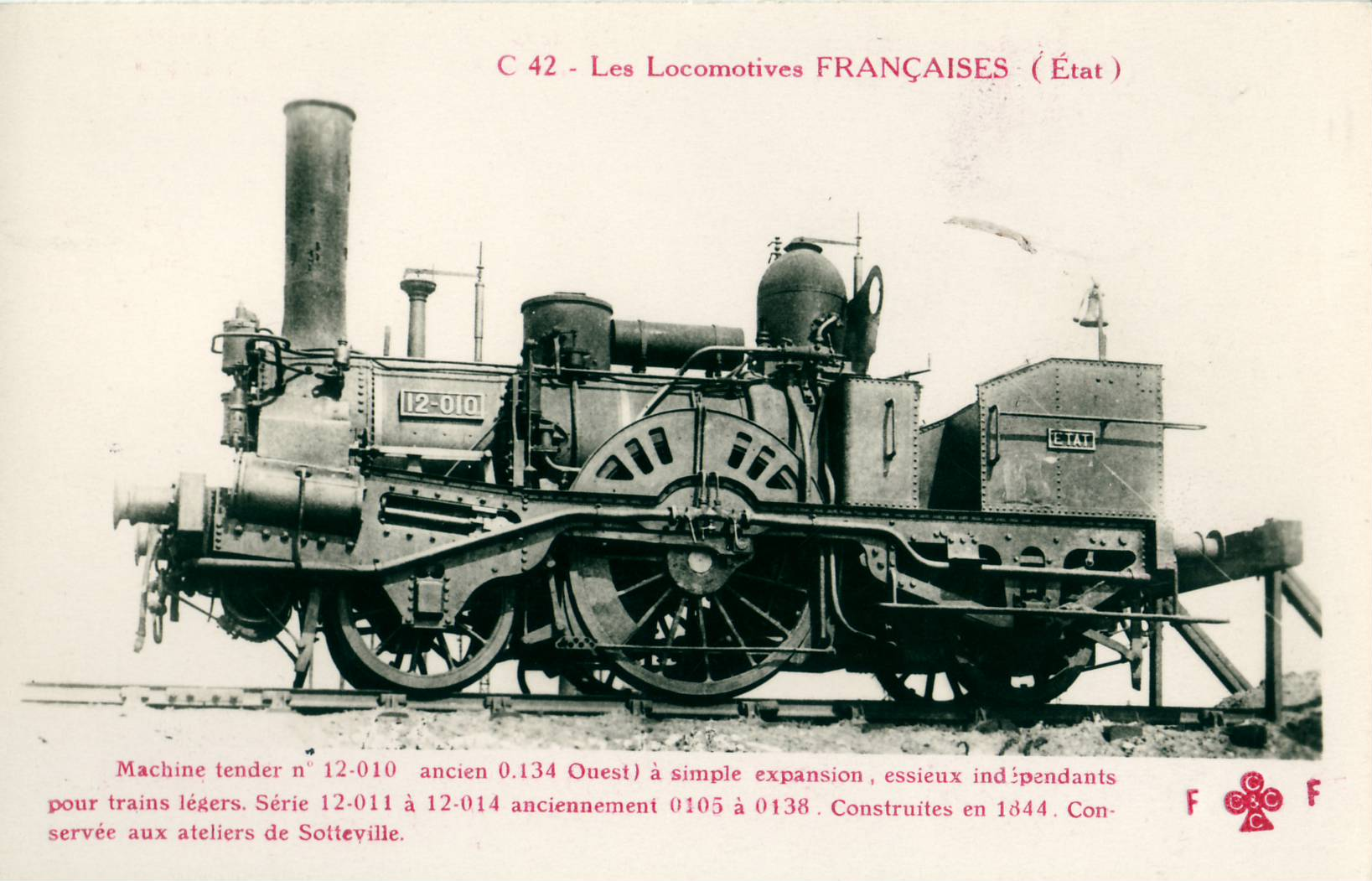 Carte postale éditée par F. Fleury / CCCC N°C42 Les locomotives françaises (État) Machine tender N°12-010 ancien 0.134 ouest à simple expension, essieux indépendants pour trains légers : Série 12-011 à 12-014 anciennement 0105 à 0138, construites en 1844, conservée aux ateliers de Sotteville